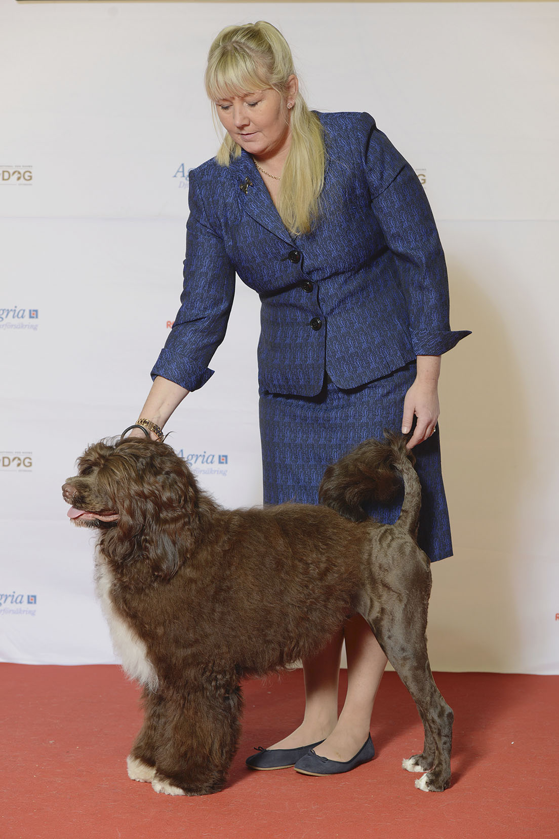 Grupp 7 POINTER, East Meadows Pandora MyDOG, Nordens största hundevenemang